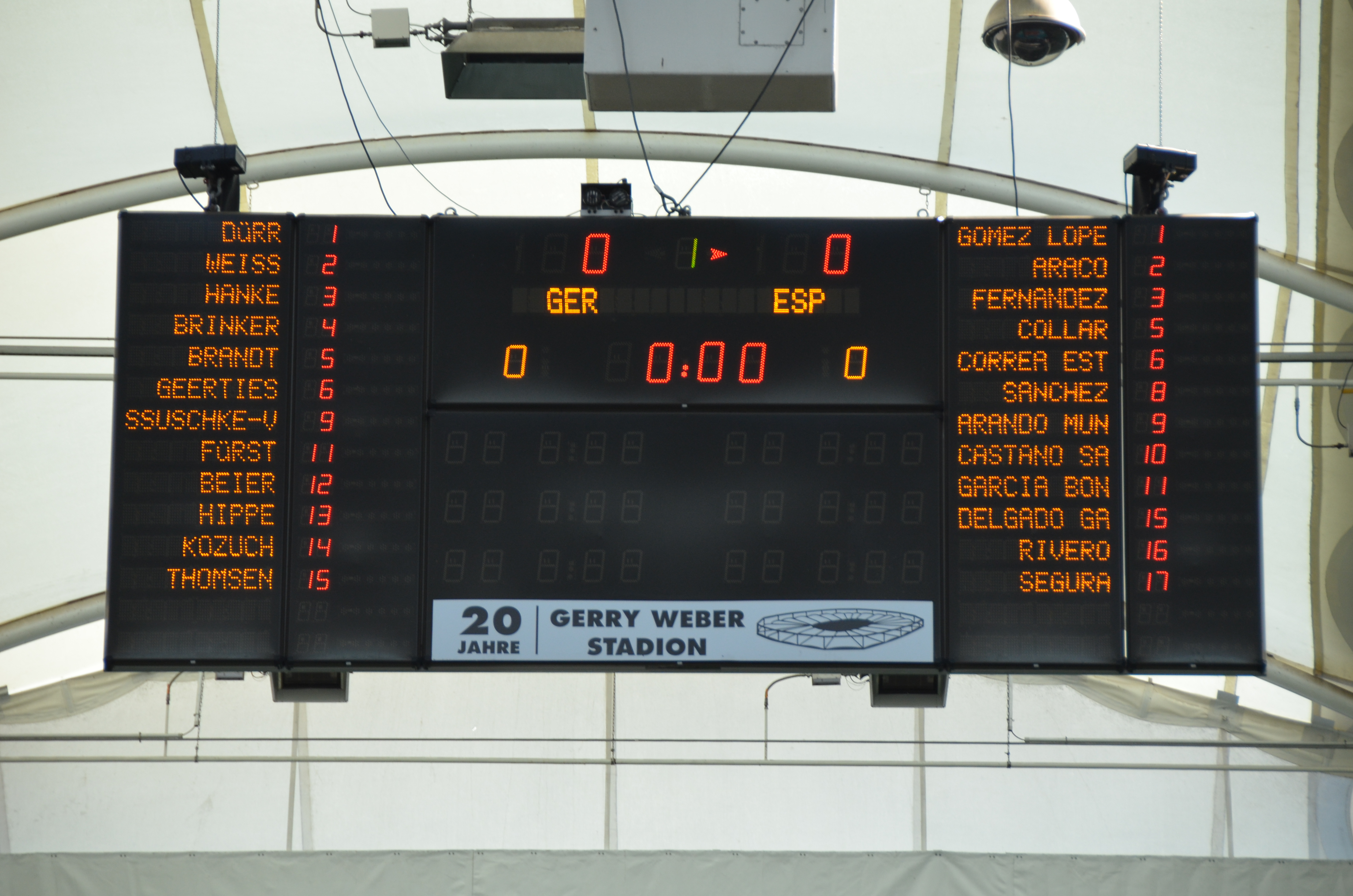 Anzeigetafel zum Spiel Deutschland - Spanien bei der Volleyball-Europameisterschaft der Frauen 2013 im Gerry-Weber-Stadion Links und rechts werden die Namen und Nummer der Spieler angezeigt. Die Zahlen über den Mannschaftsbezeichnungen (GER, ESP) geben den aktuellen Spielstand an. Der Pfeil dazwischen verweist auf die aufschlagende Mannschaft. Die Zahlen in orange nennen den Gesamtstand nach Sätzen. In der Mitte wird in roter Farbe die bisherige Spielzeit angezeigt.